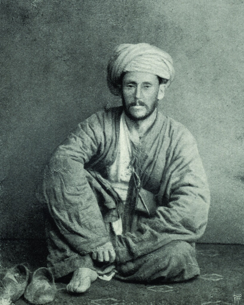 Vámbéry Ármin szegény dervisnek öltözve valamol egyturkesztáni karavánszerájban